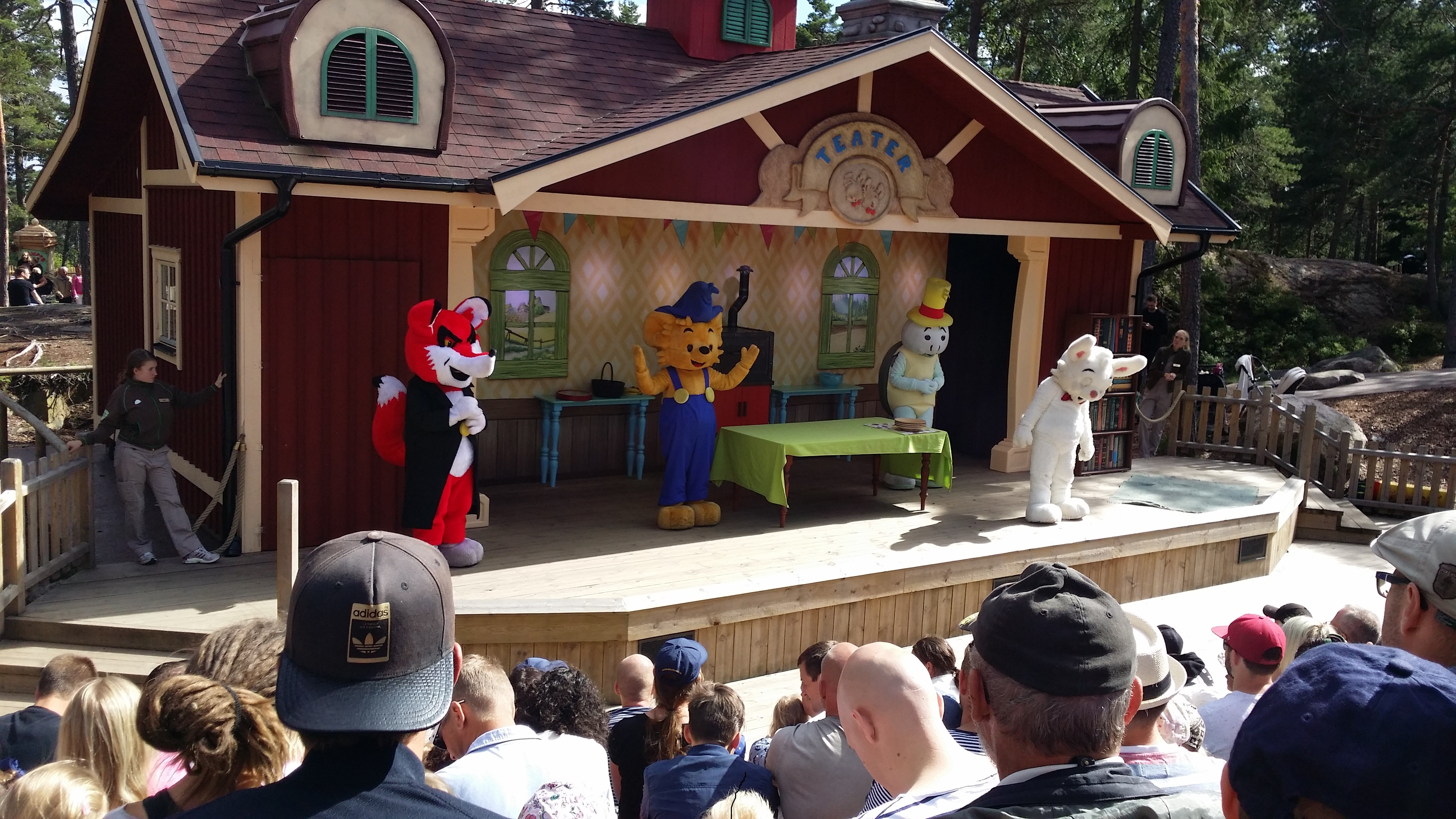 "Bamse och tårttjuven" spelas på Kolmårdens djurpark. Från vänster: Reinard Räv, Bamse, Skalman och Lille Skutt.